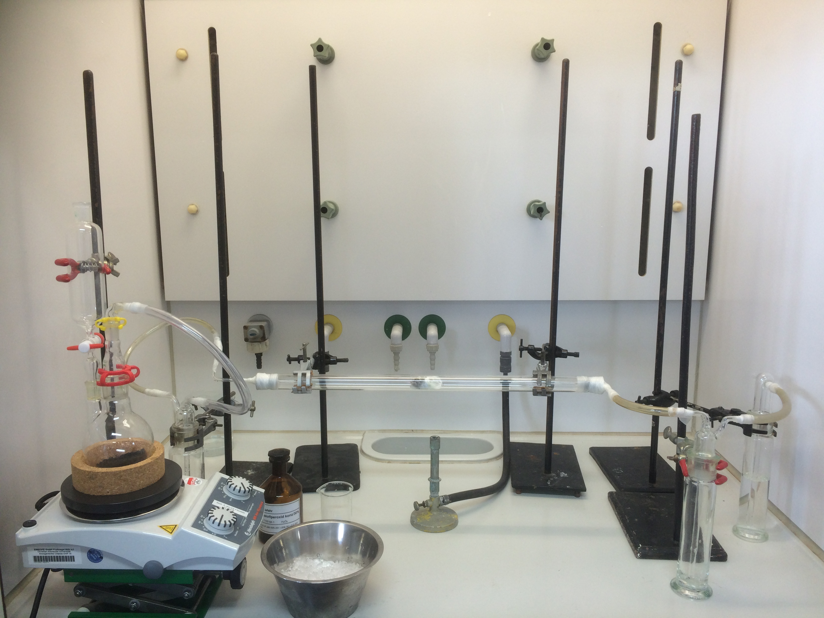 Ein Laboraufbau des Ostwaldverfahrens.